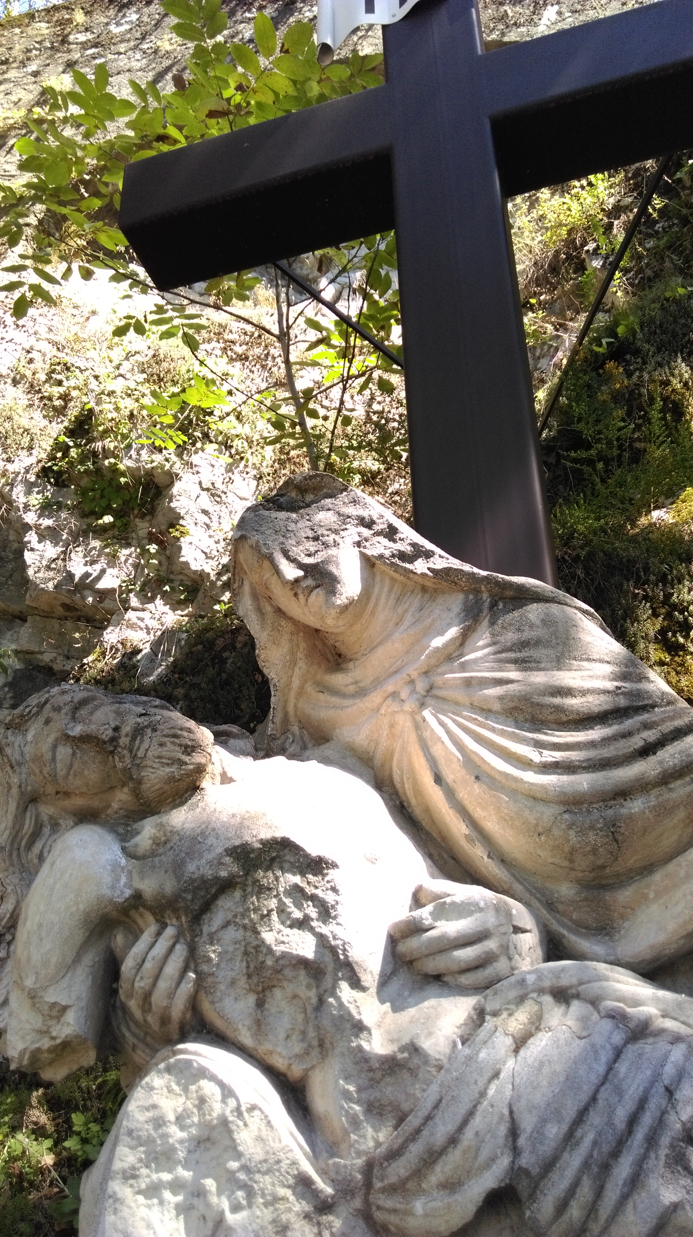 Croix noire et Pieta en pierre blanche à Chambéry sur le Faubourg Reclus menant à Aix-Les-Bains.